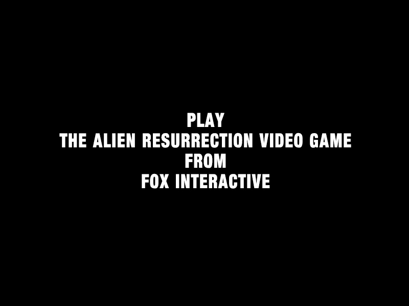 Titulo promocional colocado en los créditos de la película "Alien: Resurrection", anunciando que el videojuego estaba en desarrollo.